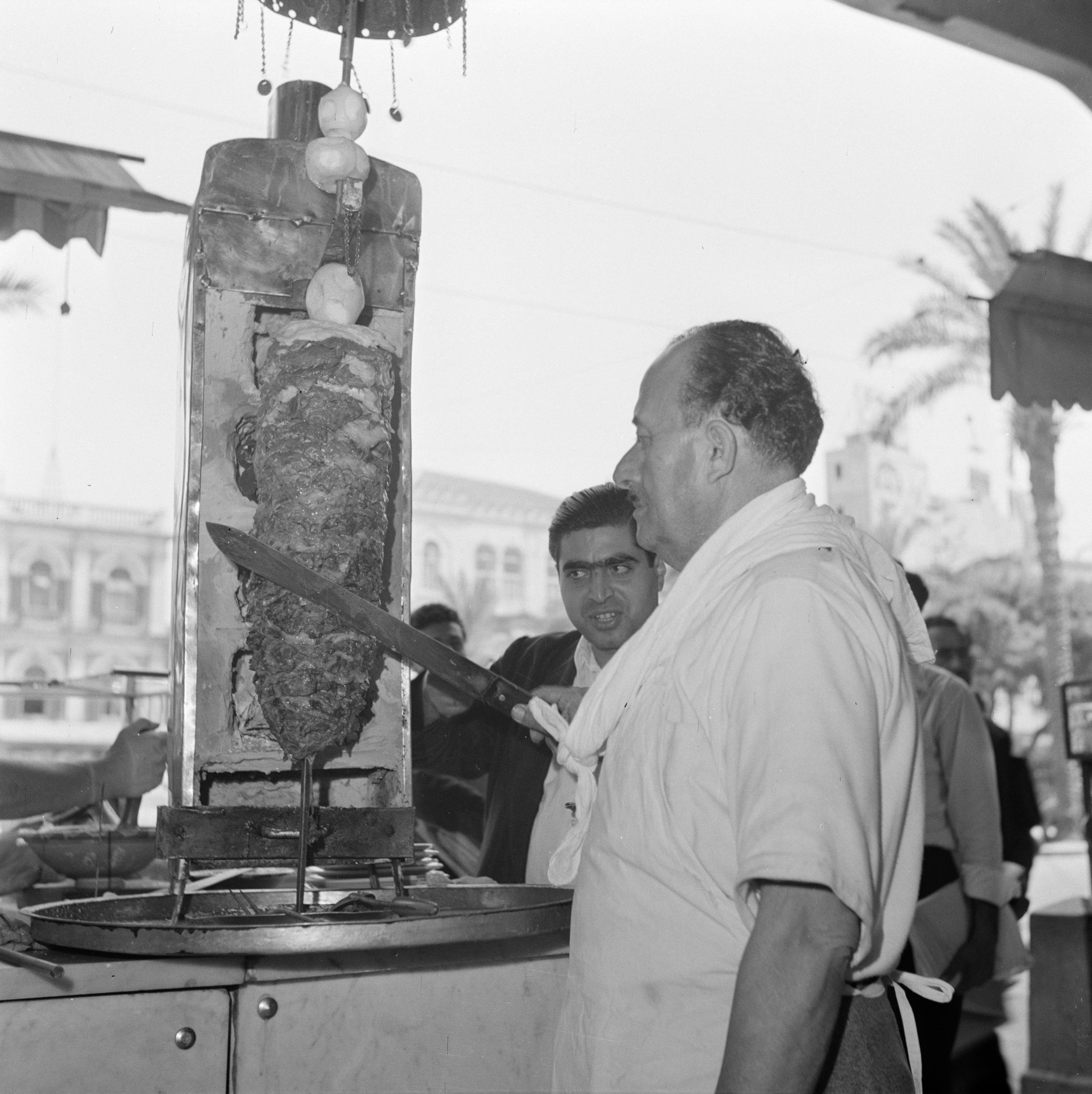 Collectie / Archief : Fotocollectie Van de Poll Reportage / Serie : Midden-Oosten 1950-1955: Libanon Beschrijving : Restauranthouder bij zijn shoarma spit Datum : 1950 Locatie : Beiroet, Libanon Trefwoorden : restaurants, vlees Fotograaf : Poll, Willem van de Auteursrechthebbende : Nationaal Archief Materiaalsoort : Negatief (zwart/wit) Nummer archiefinventaris : bekijk toegang 2.24.14.02 Bestanddeelnummer : 255-6510